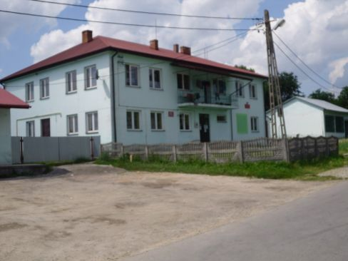 Remiza OSP w Stojeszynie Pierwszym w którym znajduje się Filia Gminnej Biblioteki Publicznej W Modliborzycach.